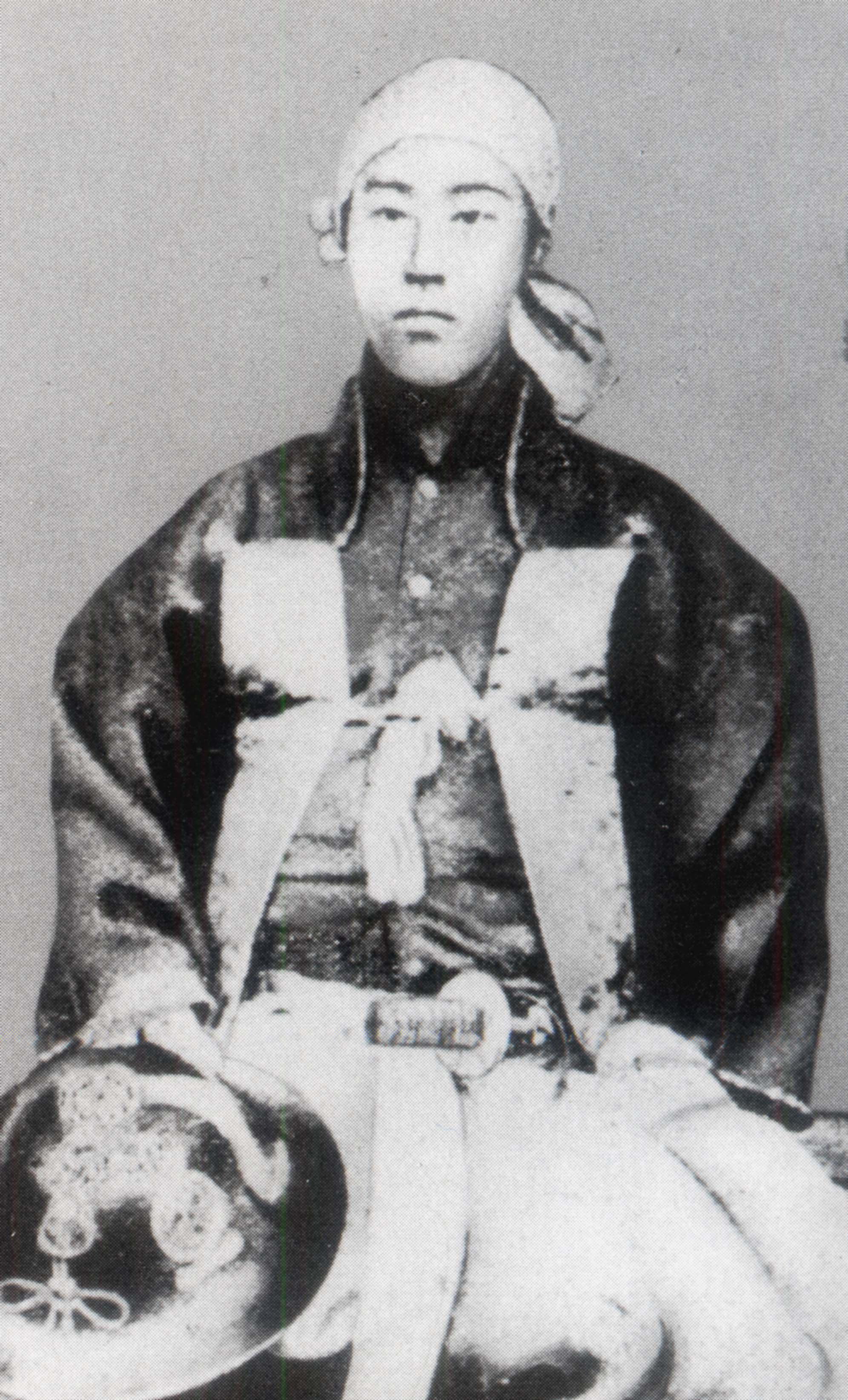 林忠祟